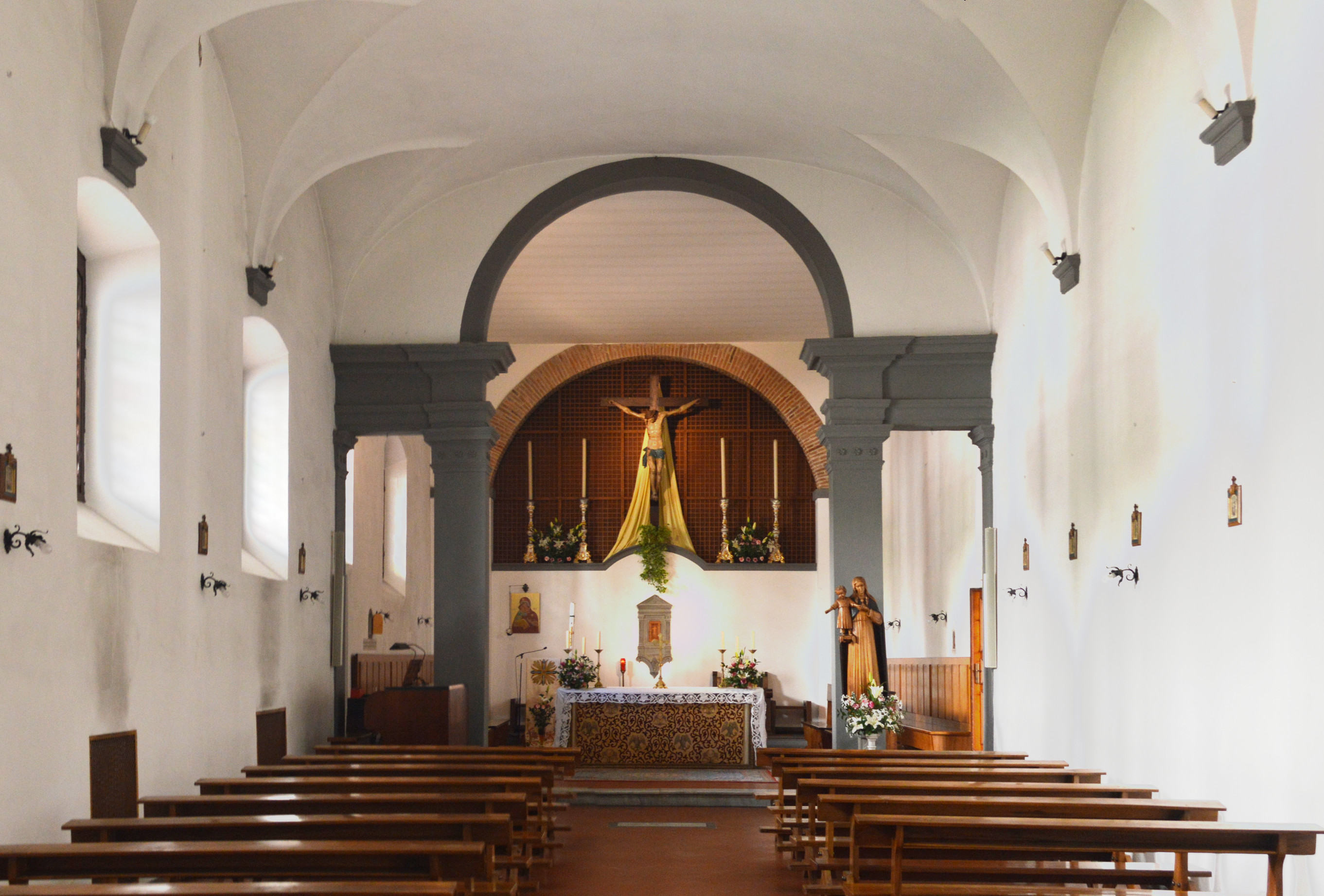 Interno.